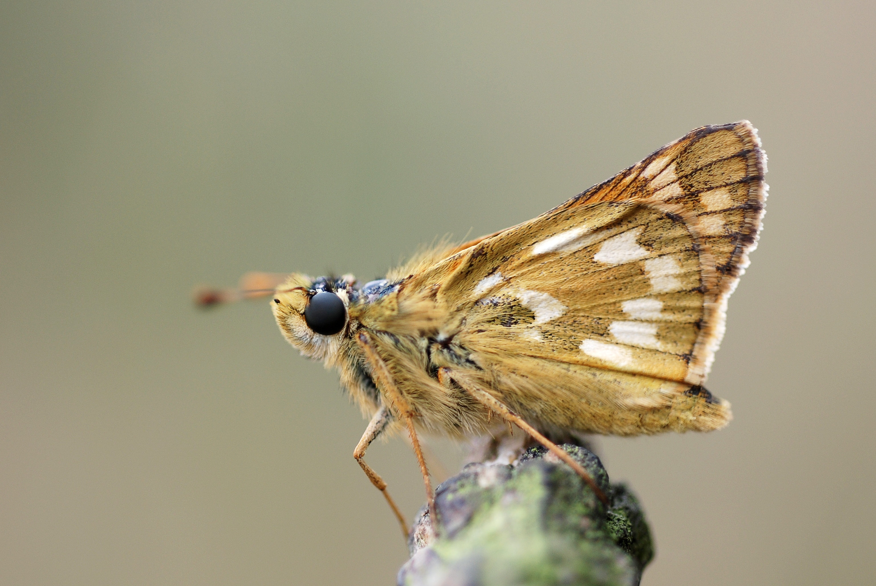 Hesperia comma male